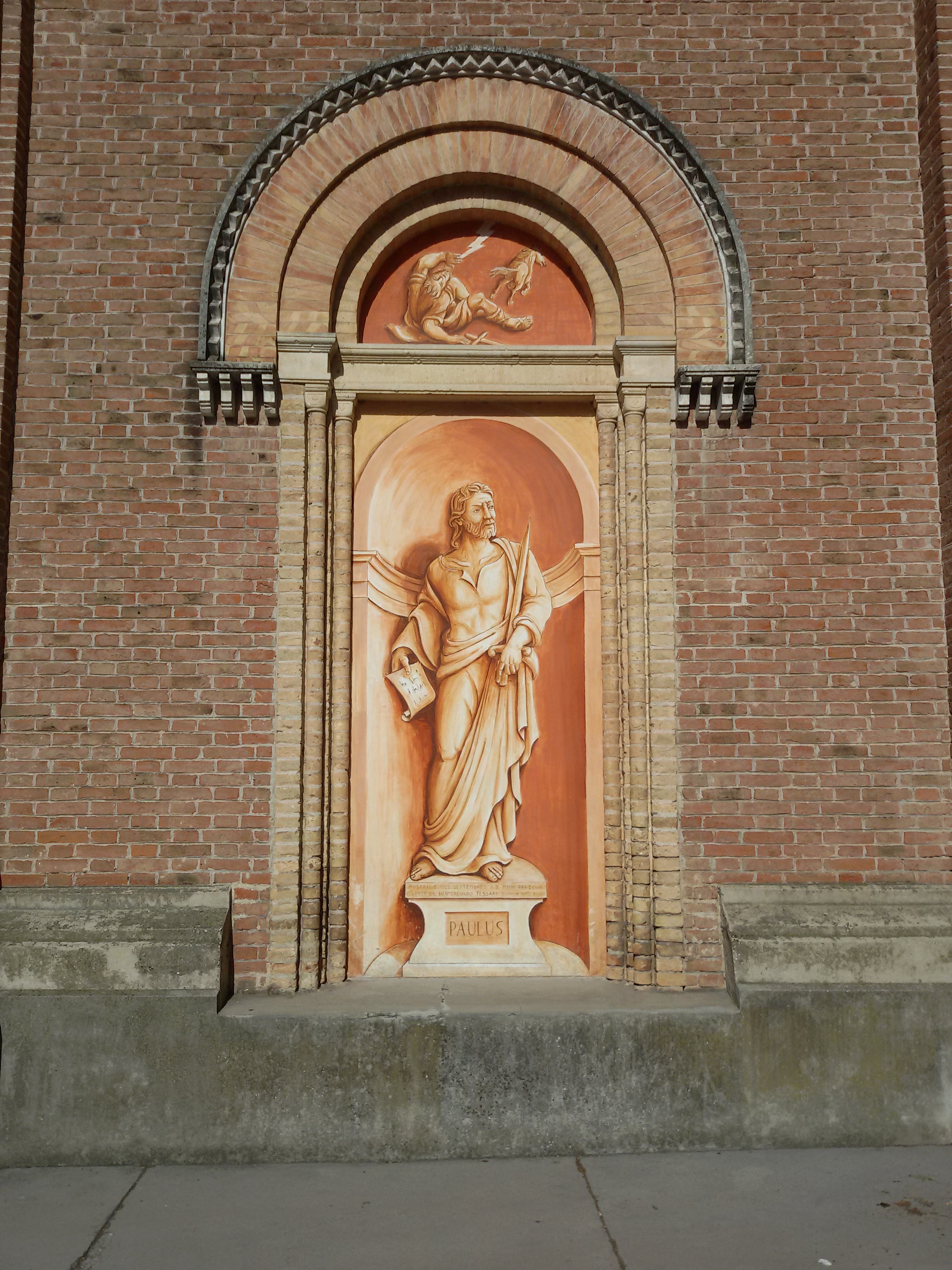 San paolo